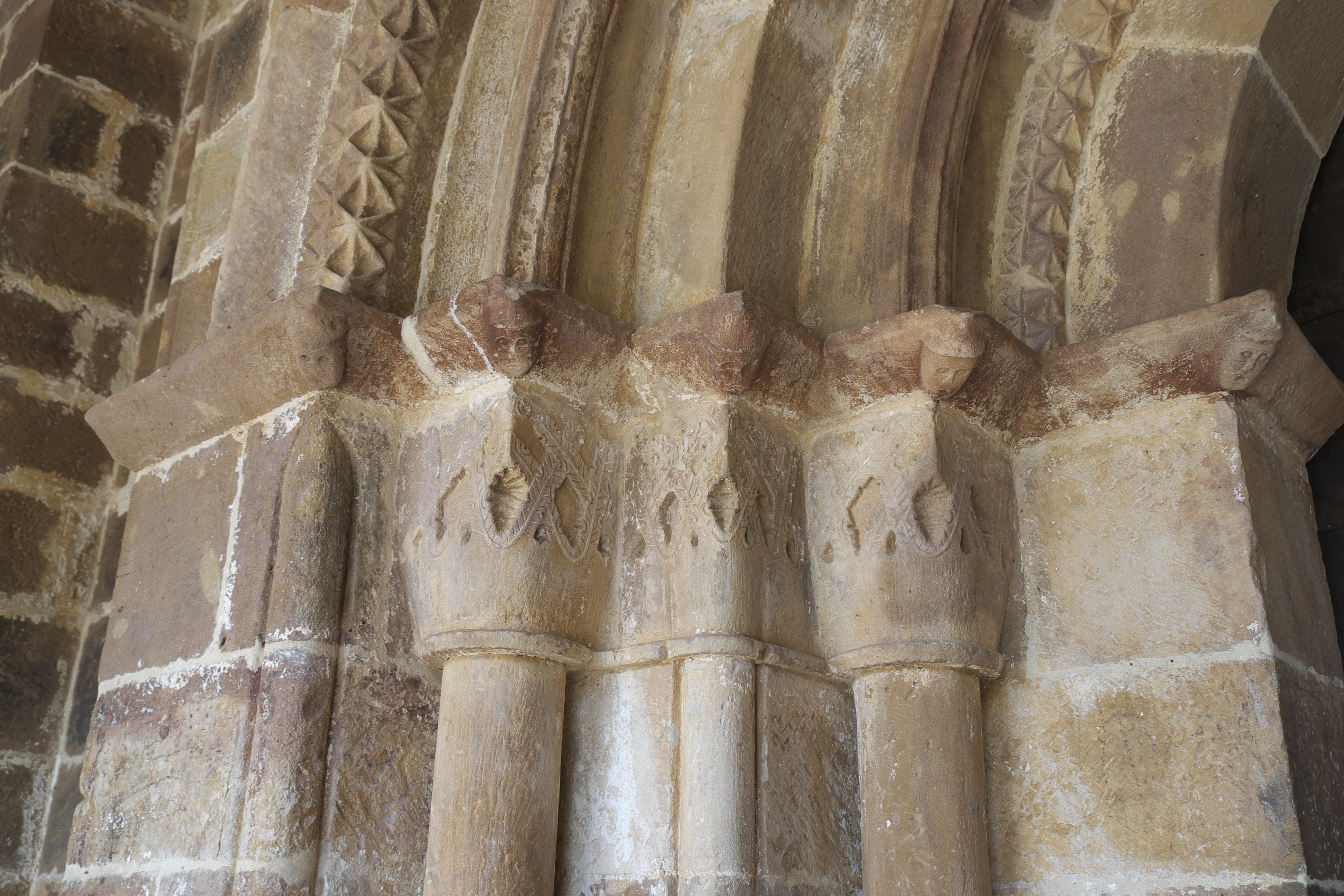 Kirche San Cornelio y San Cipriano in San Cebrián de Mudá in der Provinz Palencia (Kastilien-León/Spanien), Kapitelle des Portals